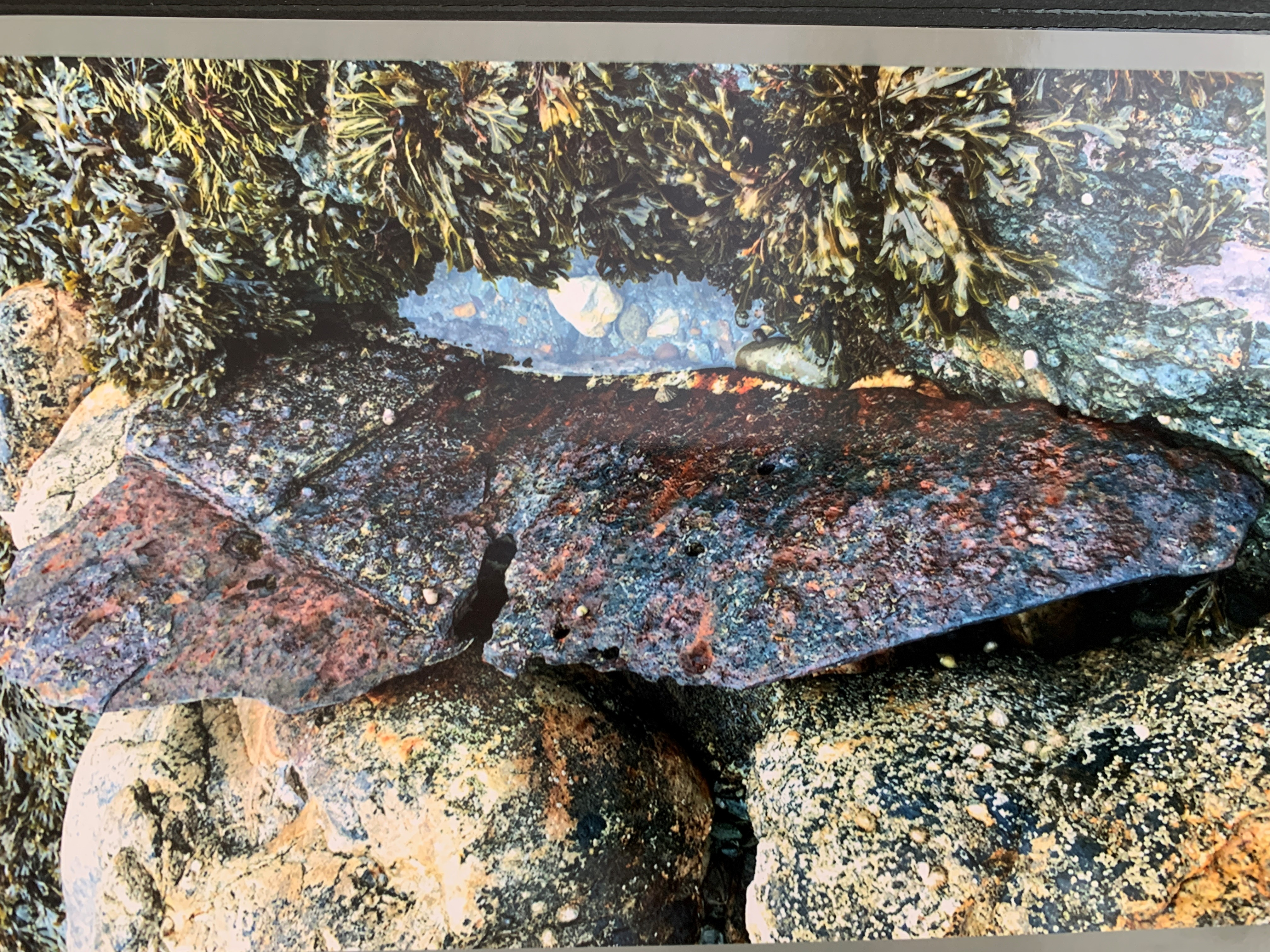 Darn haearn o'r Stewart sydd i'w weld ar drai'n Mhorth Ty Mawr.